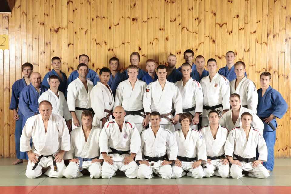 USK Judo Praha